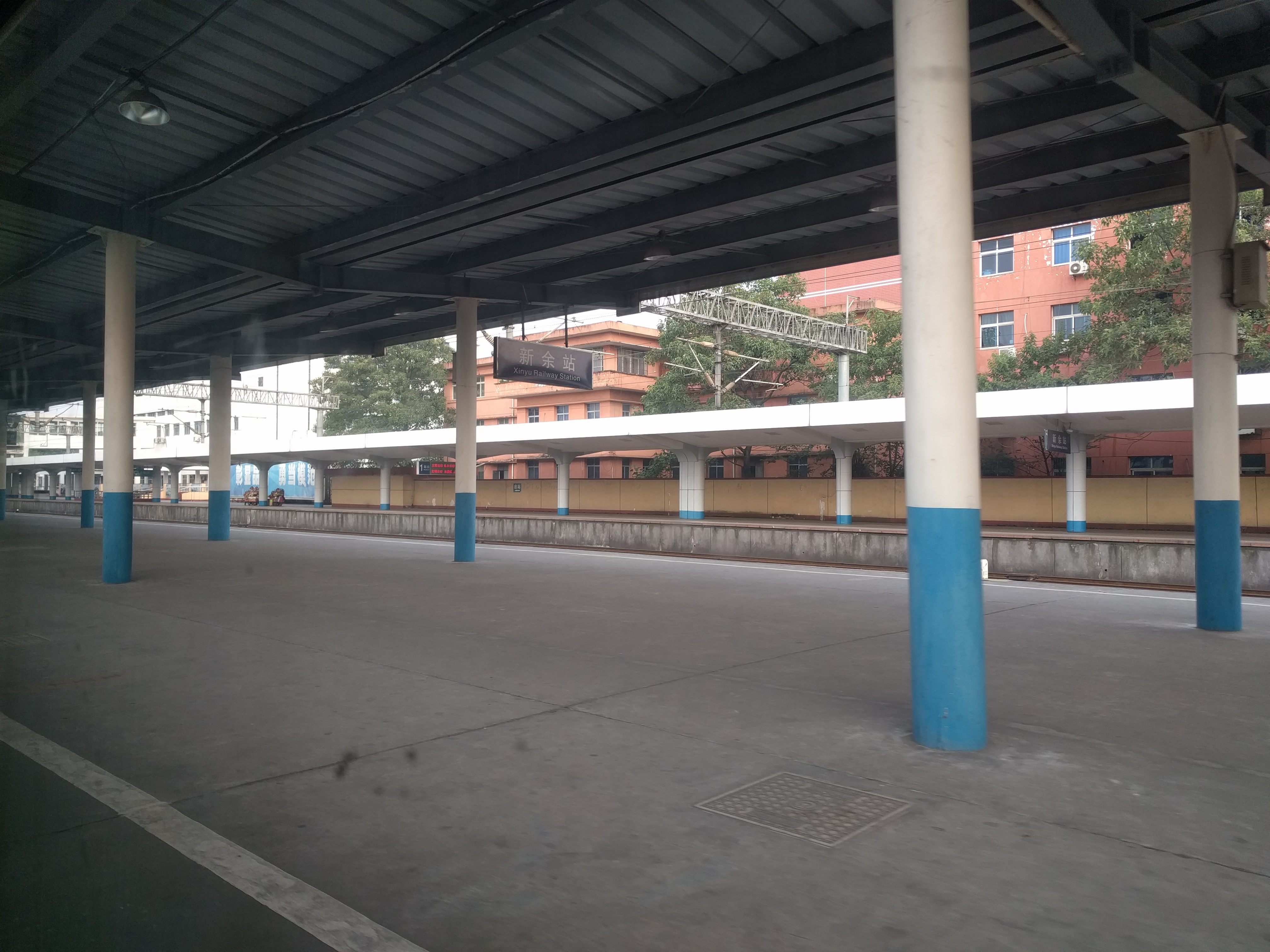 新余站站台